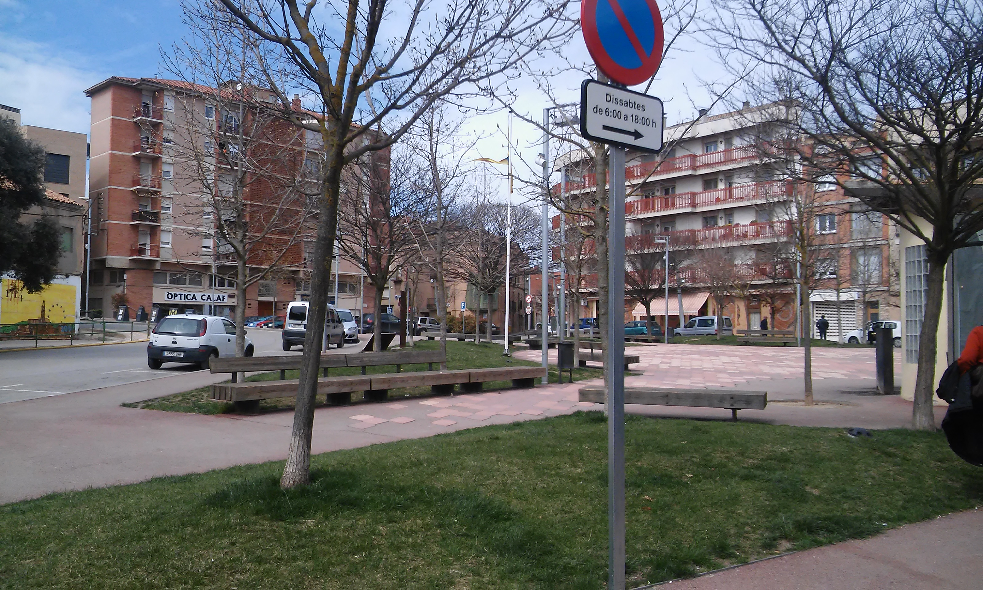 La plaça dels arbres de Calaf (Anoia, Catalunya).